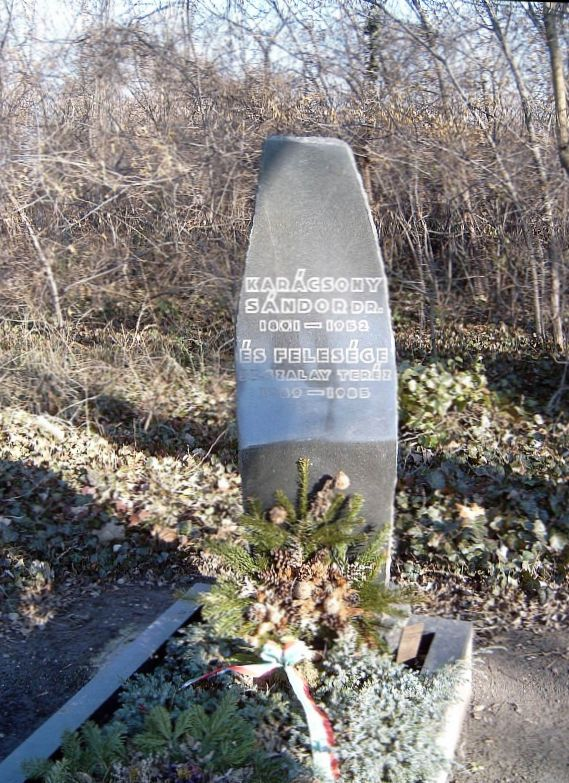 Karácsony Sándor (Földes, 1891. január 10. – Budapest, 1952. február 23.) pedagógiai, filozófiai író, egyetemi tanár sírja Budapesten. Kerepesi temető: 33/1-1-22.